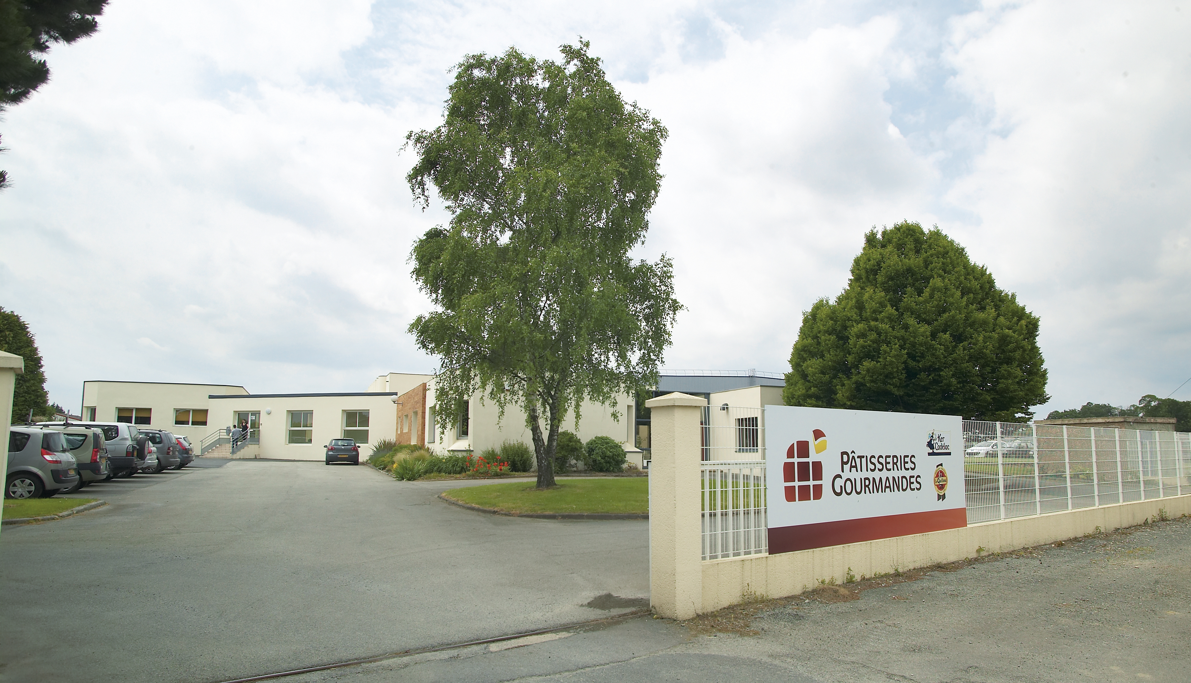 Photo du siège de Ker Cadélac